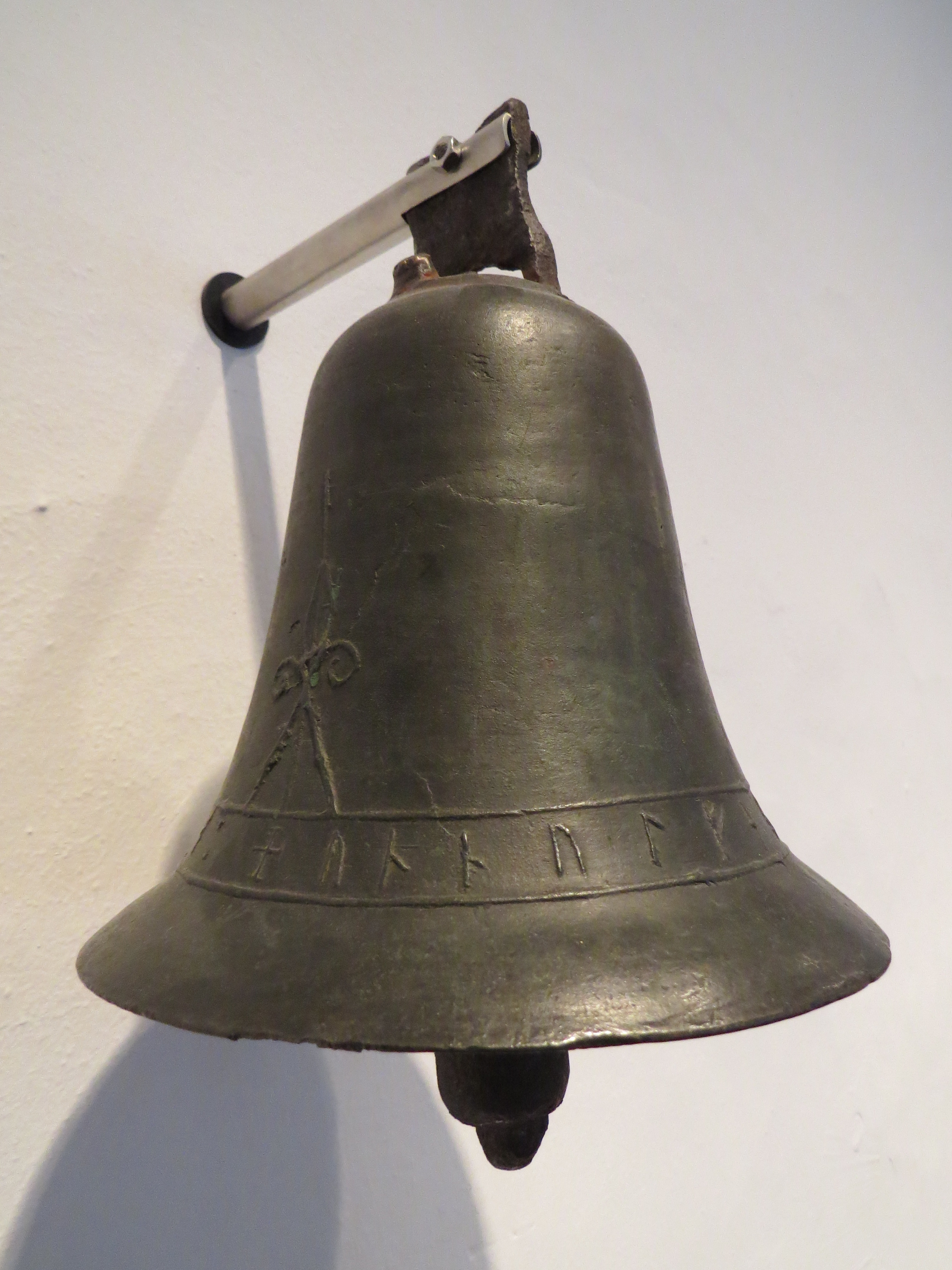 Runeklokke fra Åmotsdal (Aamodtsdal) Gamle Kirke i Telemarken, Nationalmuséet i København